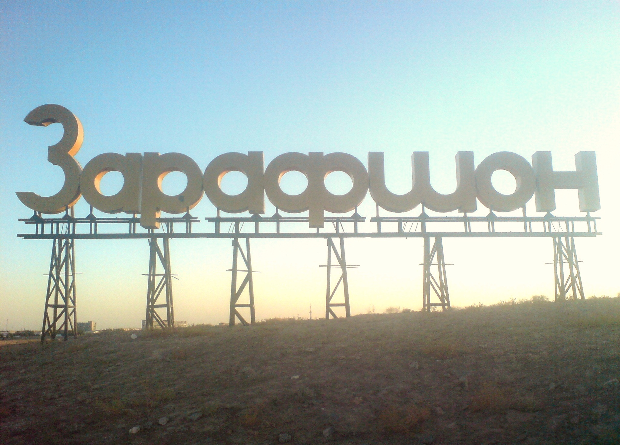 Город Зарафшан, Узбекистан